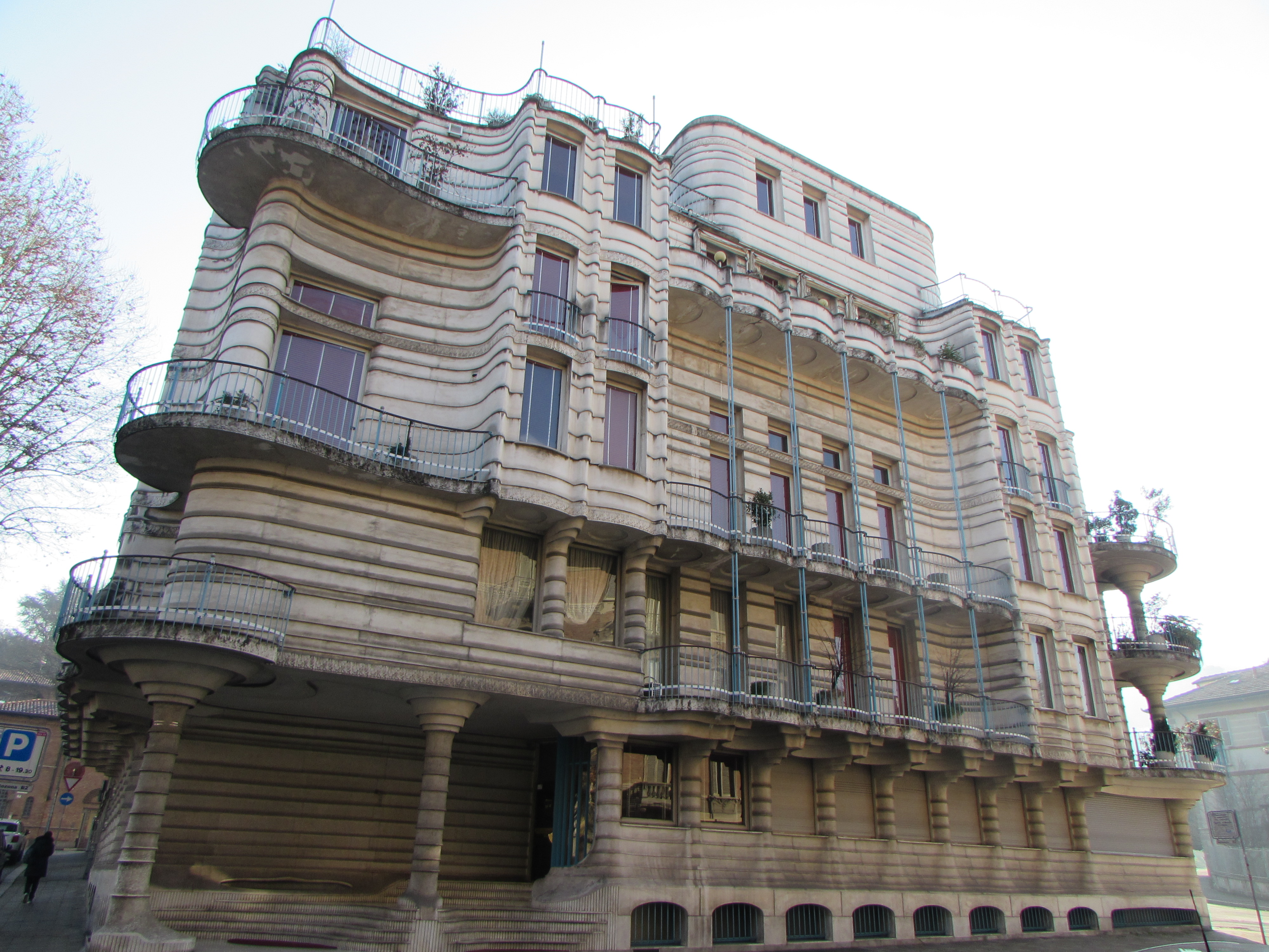 Casa degli Obelischi